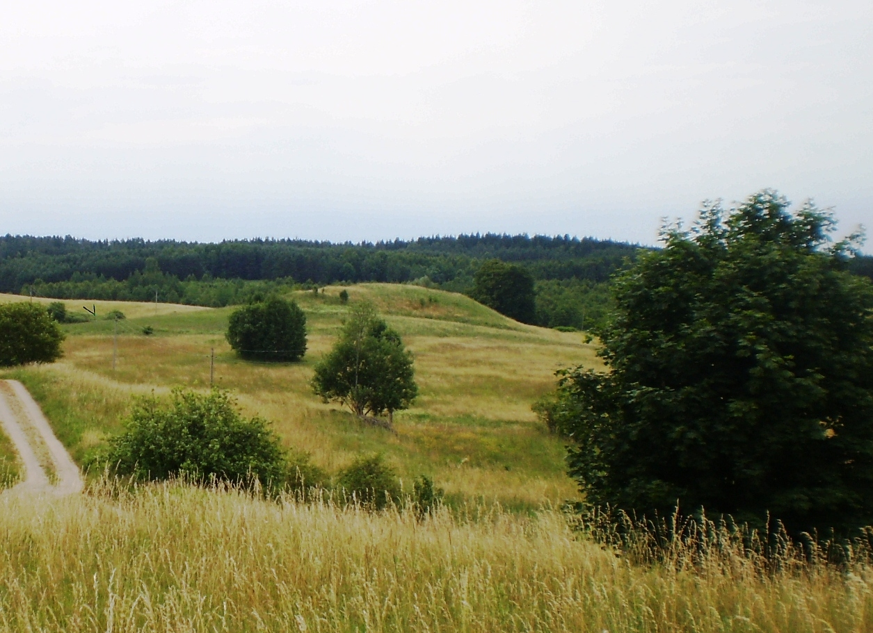 Pavištyčio II piliakalnis, Vištyčio RP, Vilkaviškio raj.